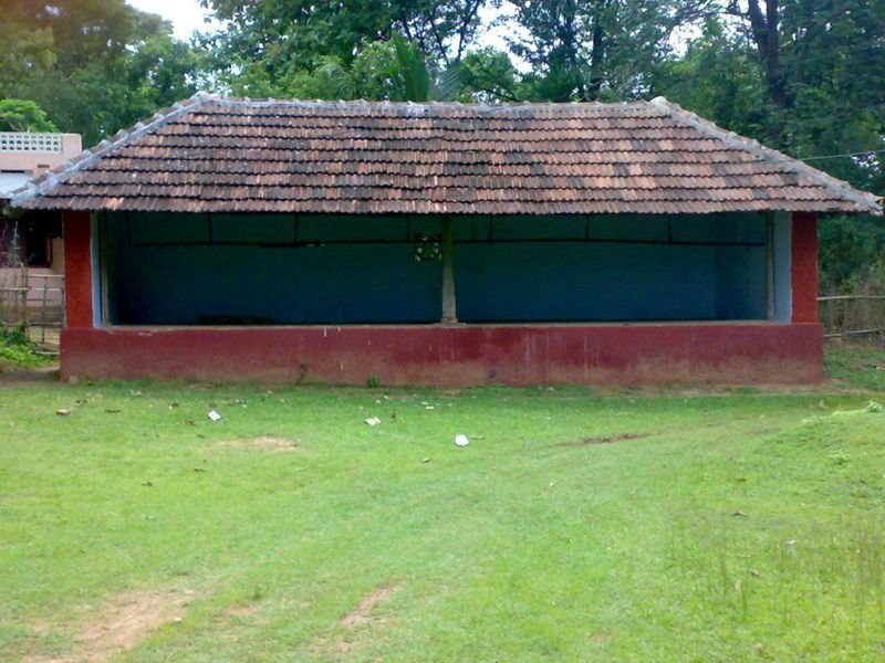 Koothumaadam Mathur Kalikavil Bhagawathy Temple.